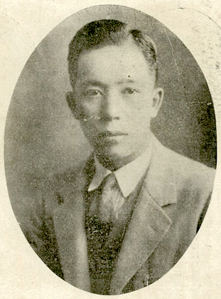 Bân-lâm-gú: 陳啟清 TÂN Khé-chheng